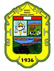 Escudo Las Lomas